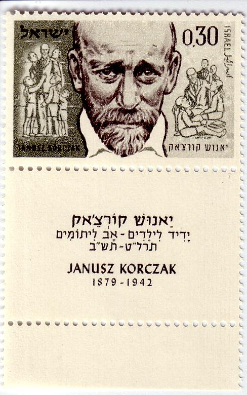 Briefmarke der Israelischen Postverwaltung von 1962 (Michel-Nr.264). Auflage:1.139.000